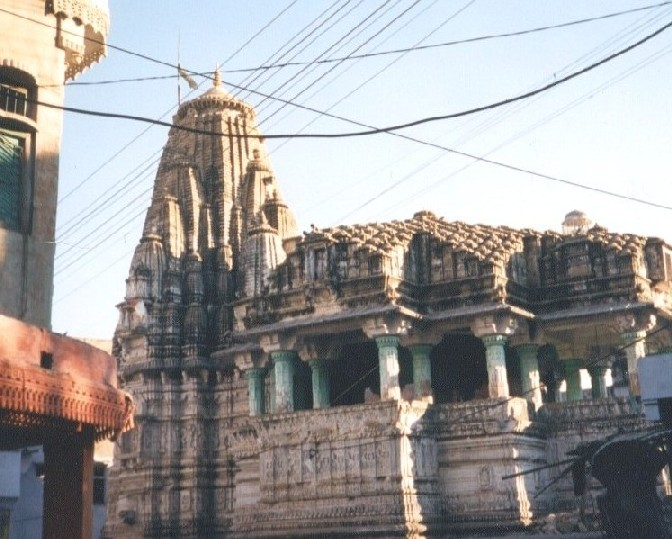 Persona foto de R. Platteau, februaro 1996, GNU FDL neniu kopirajto